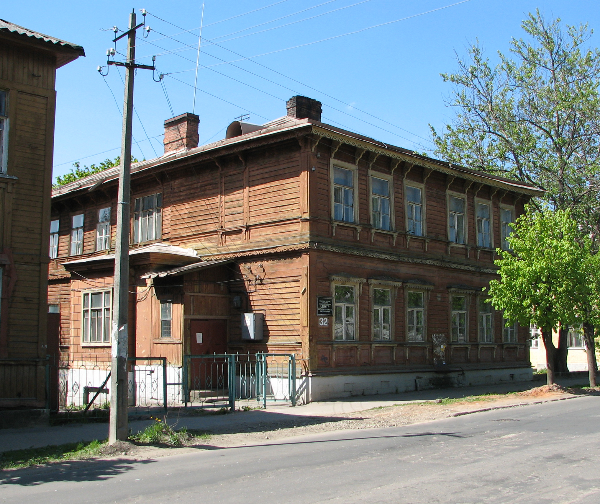 Центр дополнительного образования. Улица Чкалова, 32 (Гатчина)